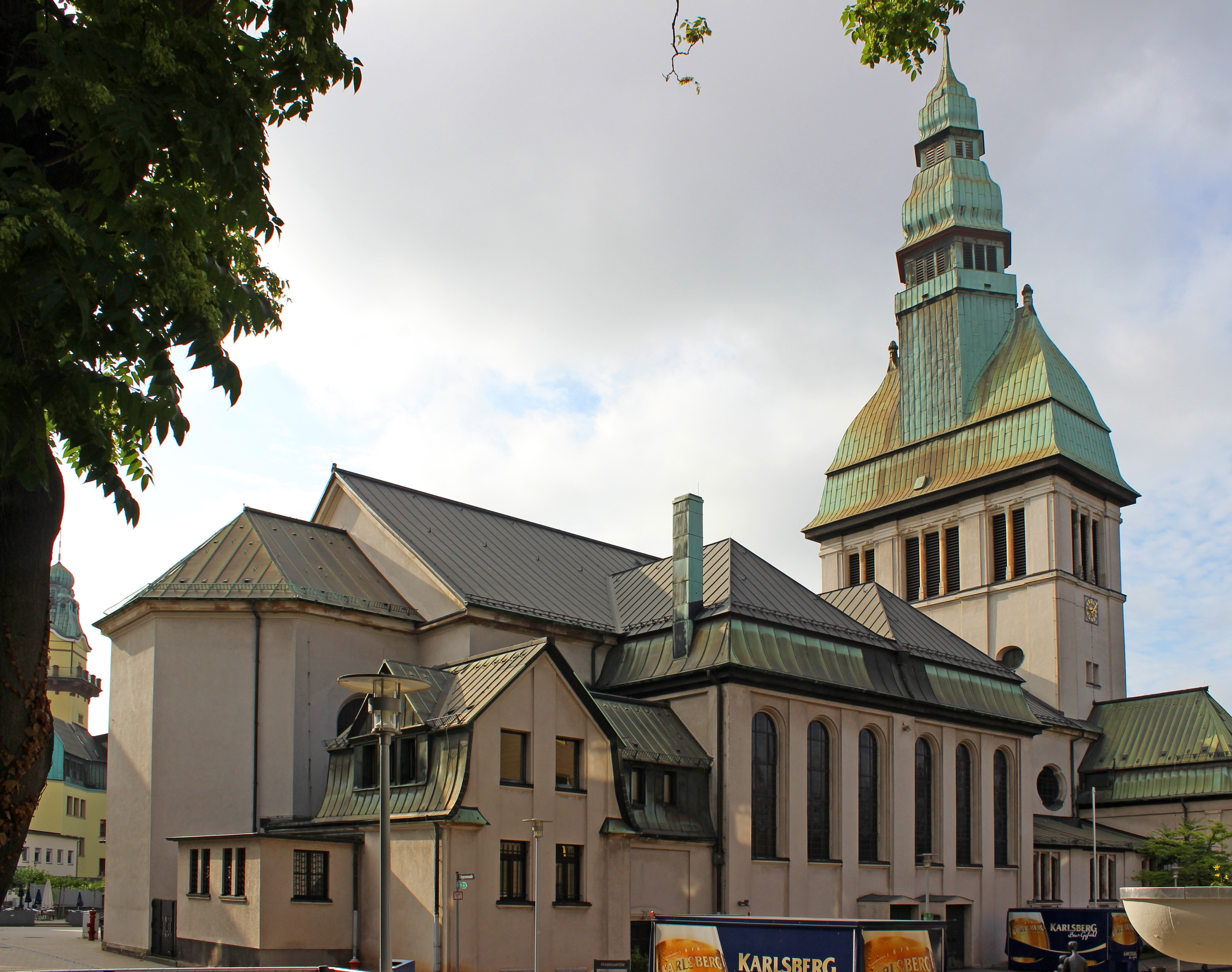 Die katholische Pfarrkirche St. Eligius in Völklingen, Saarland